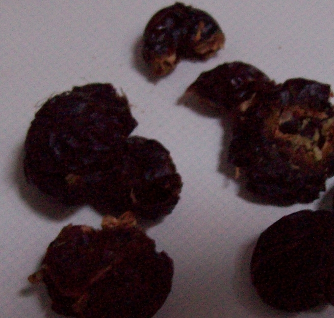 enkele wasnoten op bovenkant wasmachine